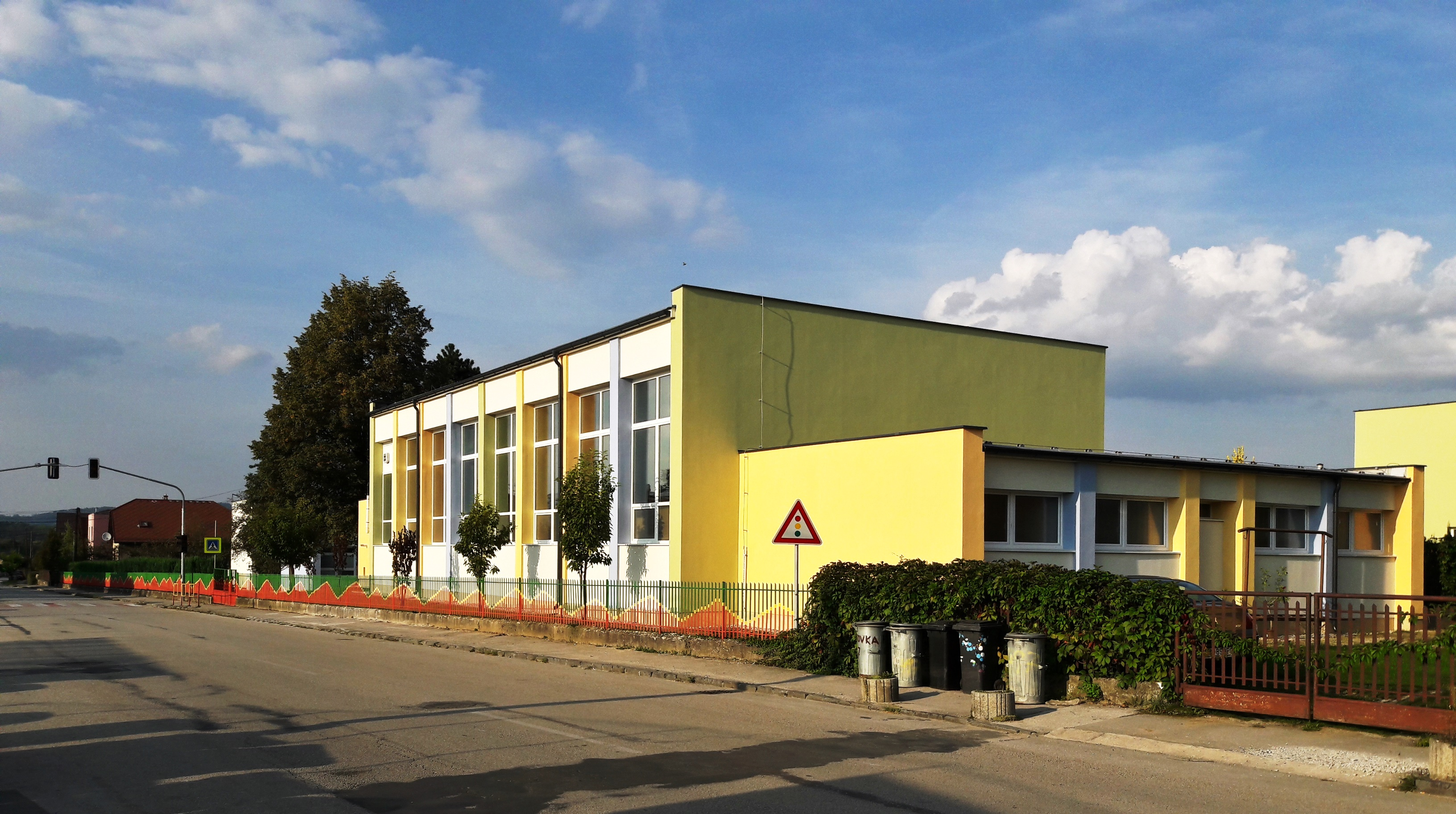 Zateplená telocvičňa základnej školy